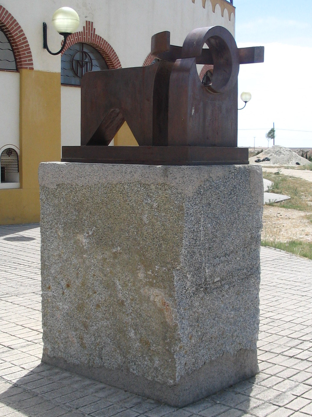 Escultura dedicada a los Toros. Entrada al coso taurino macoterano.